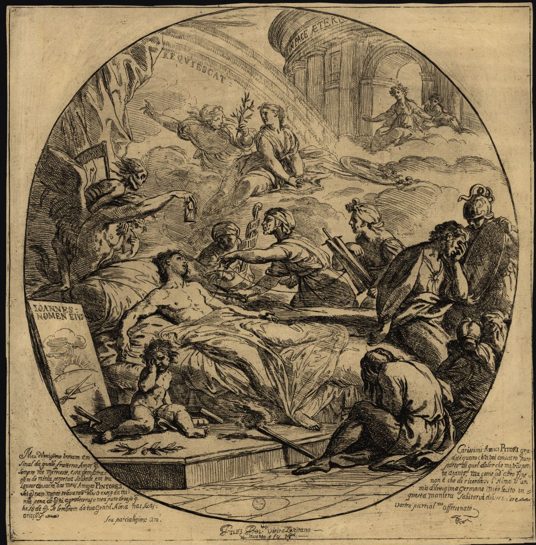 Vieira Lusitano invento e fez.